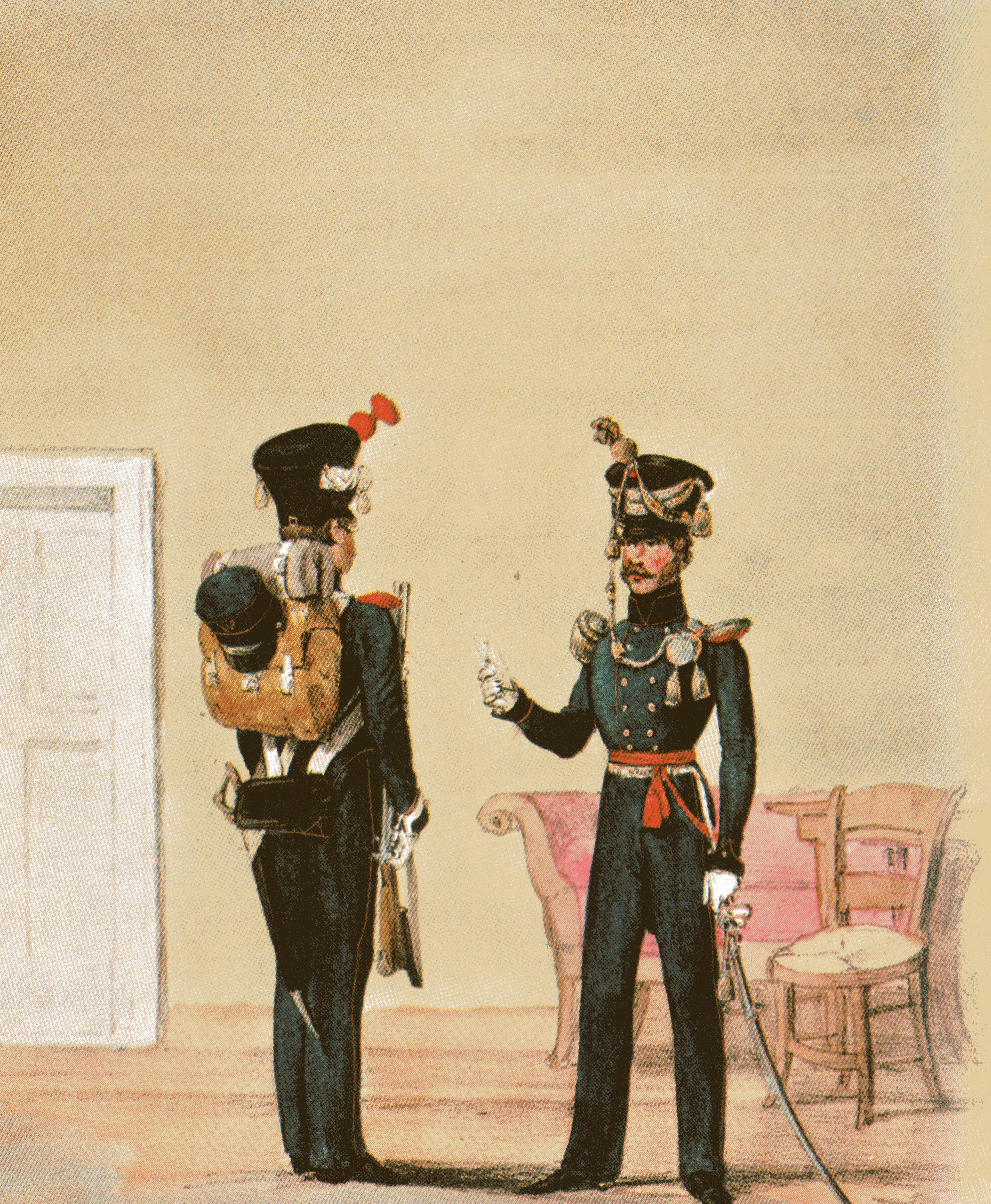 Angehörige des Königlich Württembergischen Landjägerkorps (Gendarmerie) um 1840. Links ein Landjäger, rechts ein Hauptmann. Königsblaue Uniform analog zur Königlich Württembergischen Armee